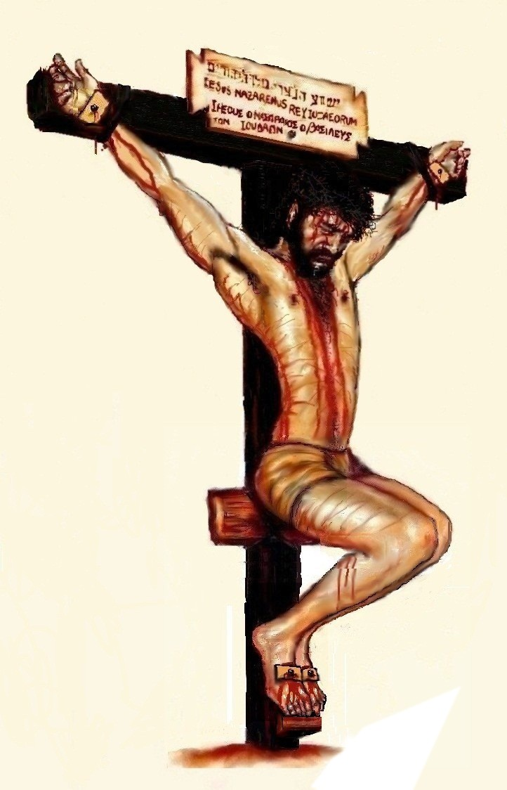 Cruz Commissa.